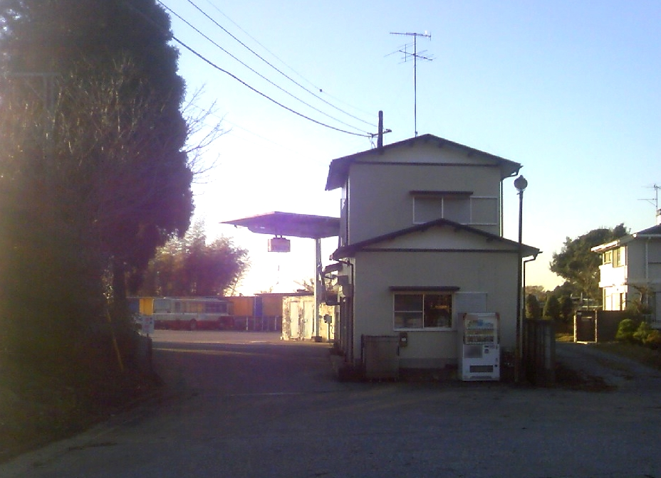 日東交通木更津運輸営業所（平岡車庫）